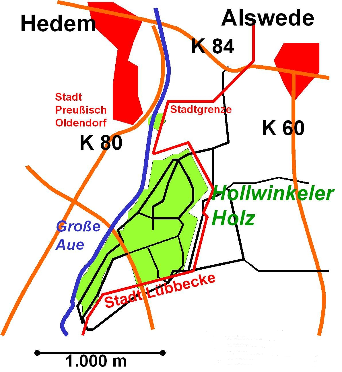 Lagekarte des Hollwinkeler Holzes, einem Waldgebiet zwischen Lübbecke und Preußisch Oldendorf in Nordrhein-Westfalen.